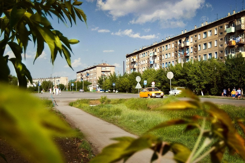 Татарск. Ул. Ленина